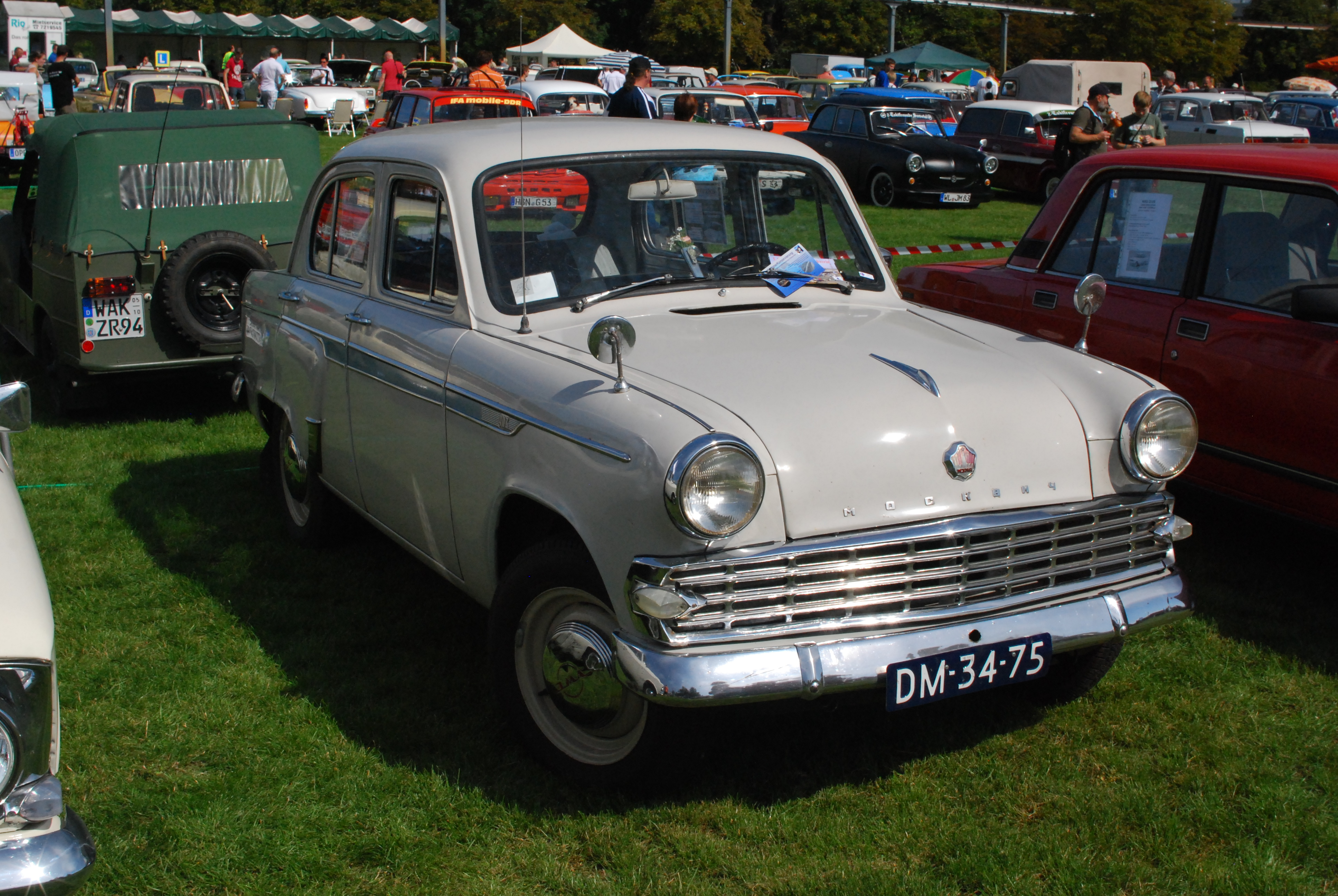 Fotos von der OMMMA 2011 am 03.09.2011 im Magdeburger Elbauenpark